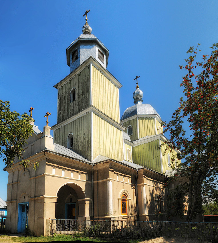 Козьмодем'янiвська церква старообрядців в с.Біла Криниця на Буковині